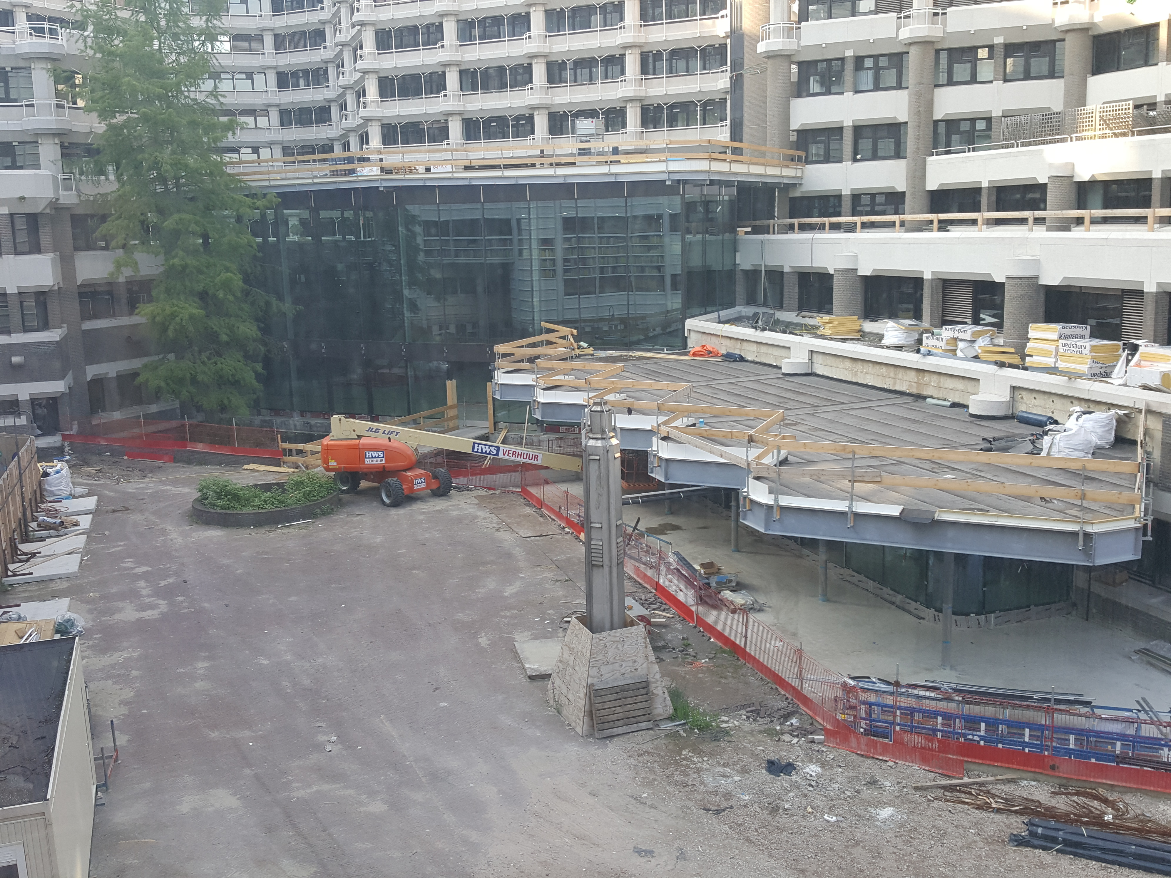 Glass panels are in, building the public entrance of the temporary Dutch Parliament, 21 august 2019